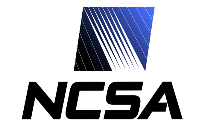 Logo von NCSA